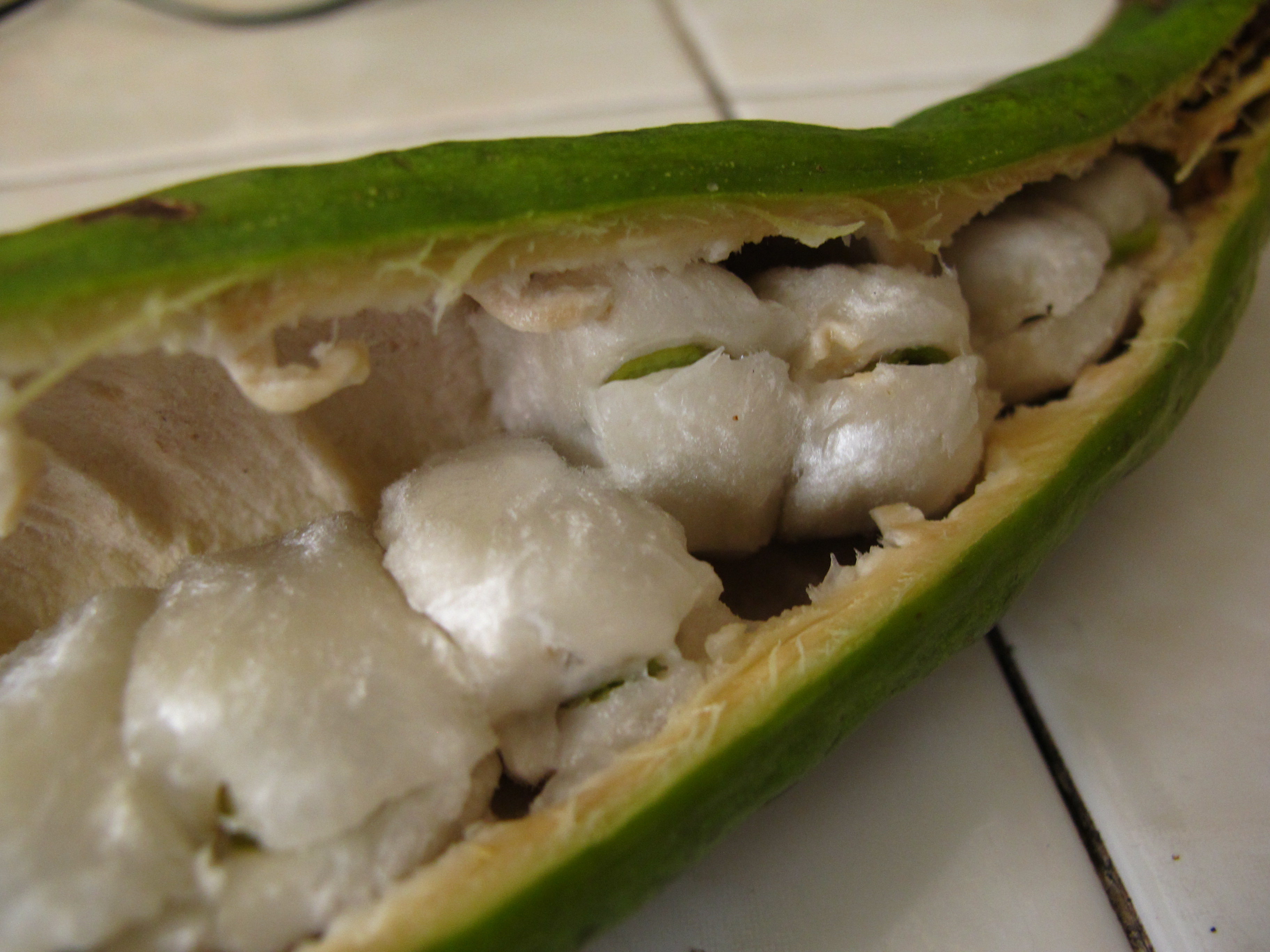 Se ve el algodon que se come, alrededor de la semilla.